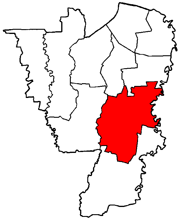 Pasar Minggu, a subdistrict of South Jakarta, Jakarta, Indonesia